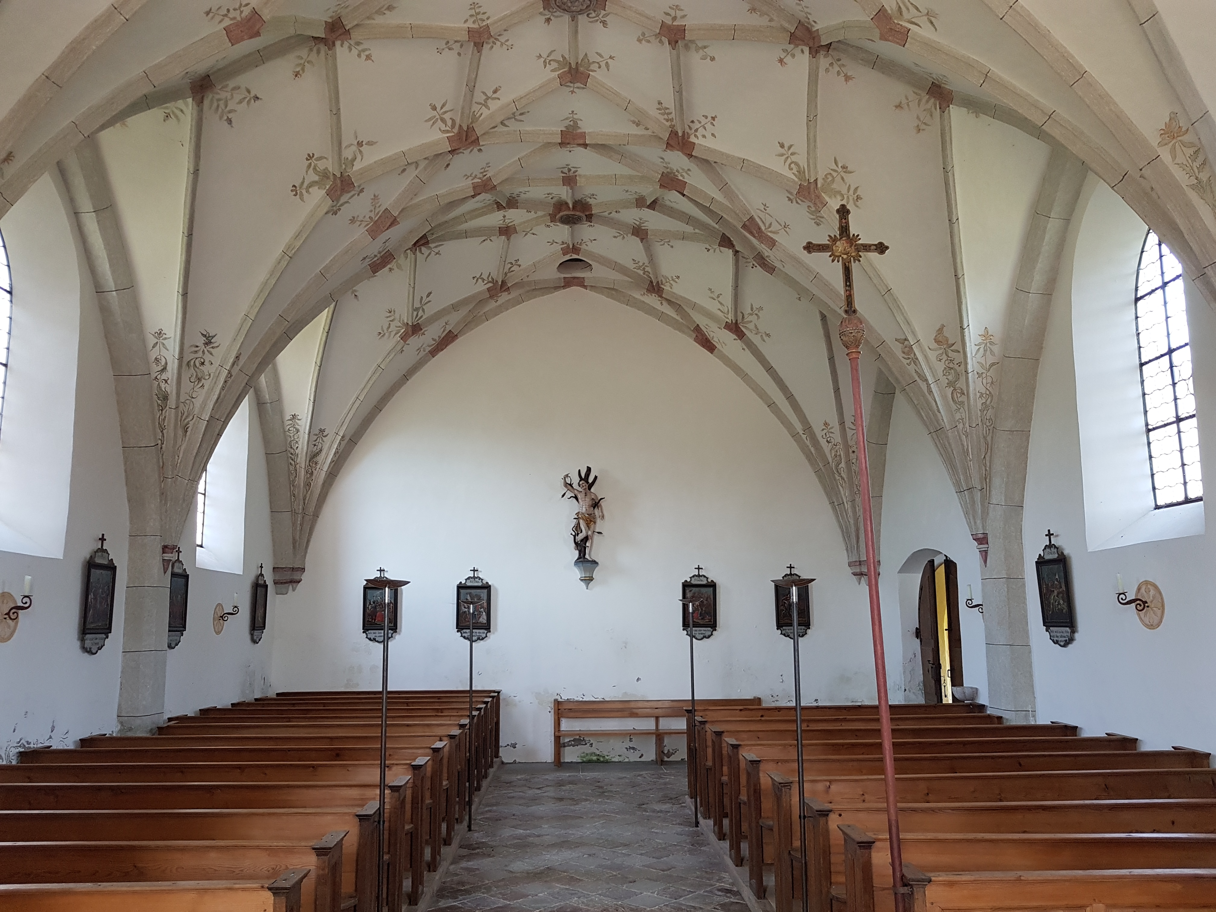 St. Georg (Georgenried), Innenraum mit Blick zur Westwand